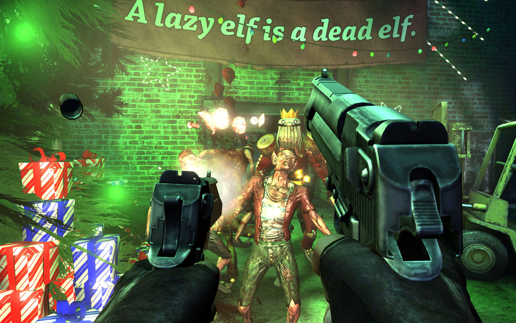 Action du jeu vidéo Killing Floor